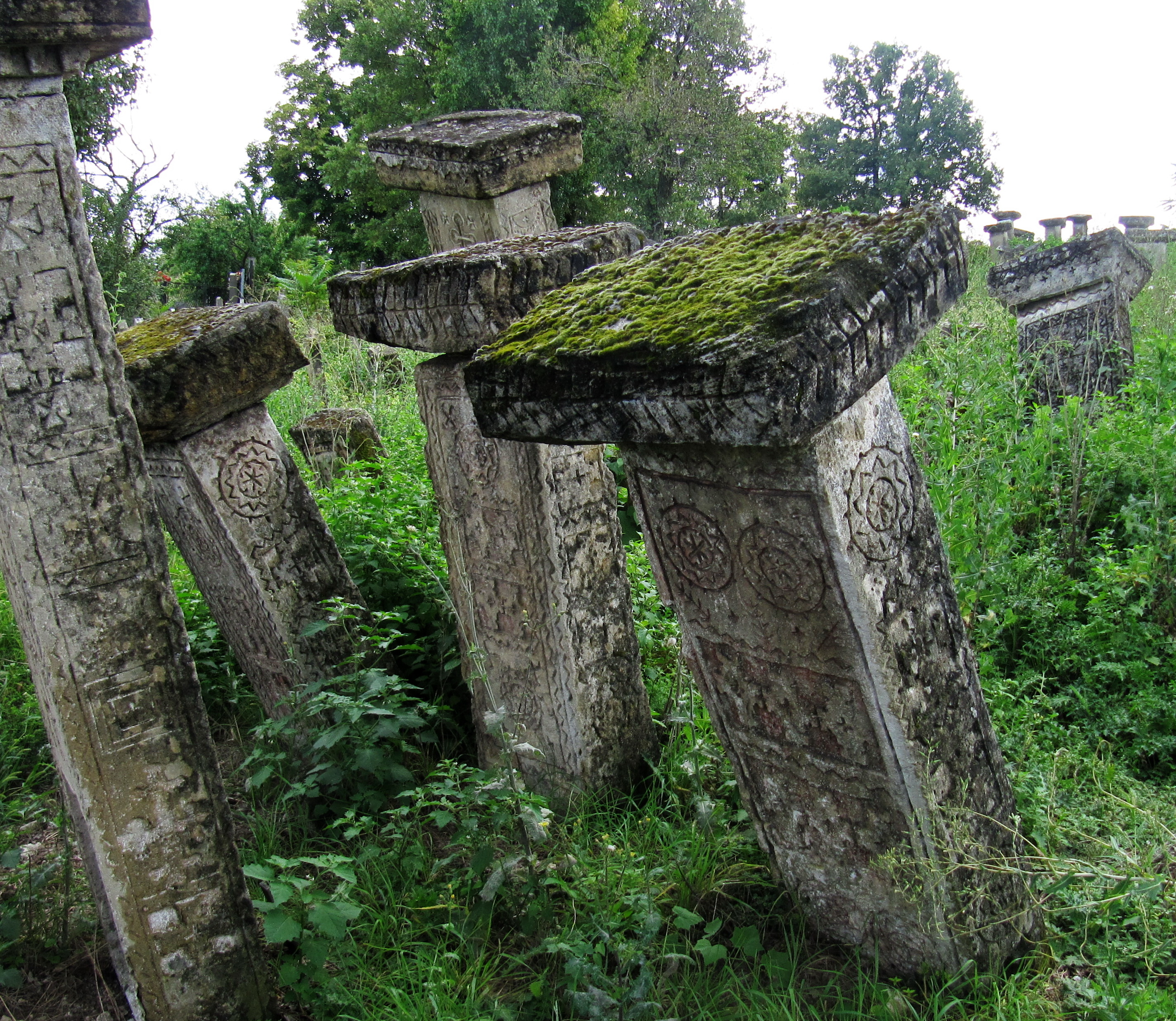 Rajac, Serbia